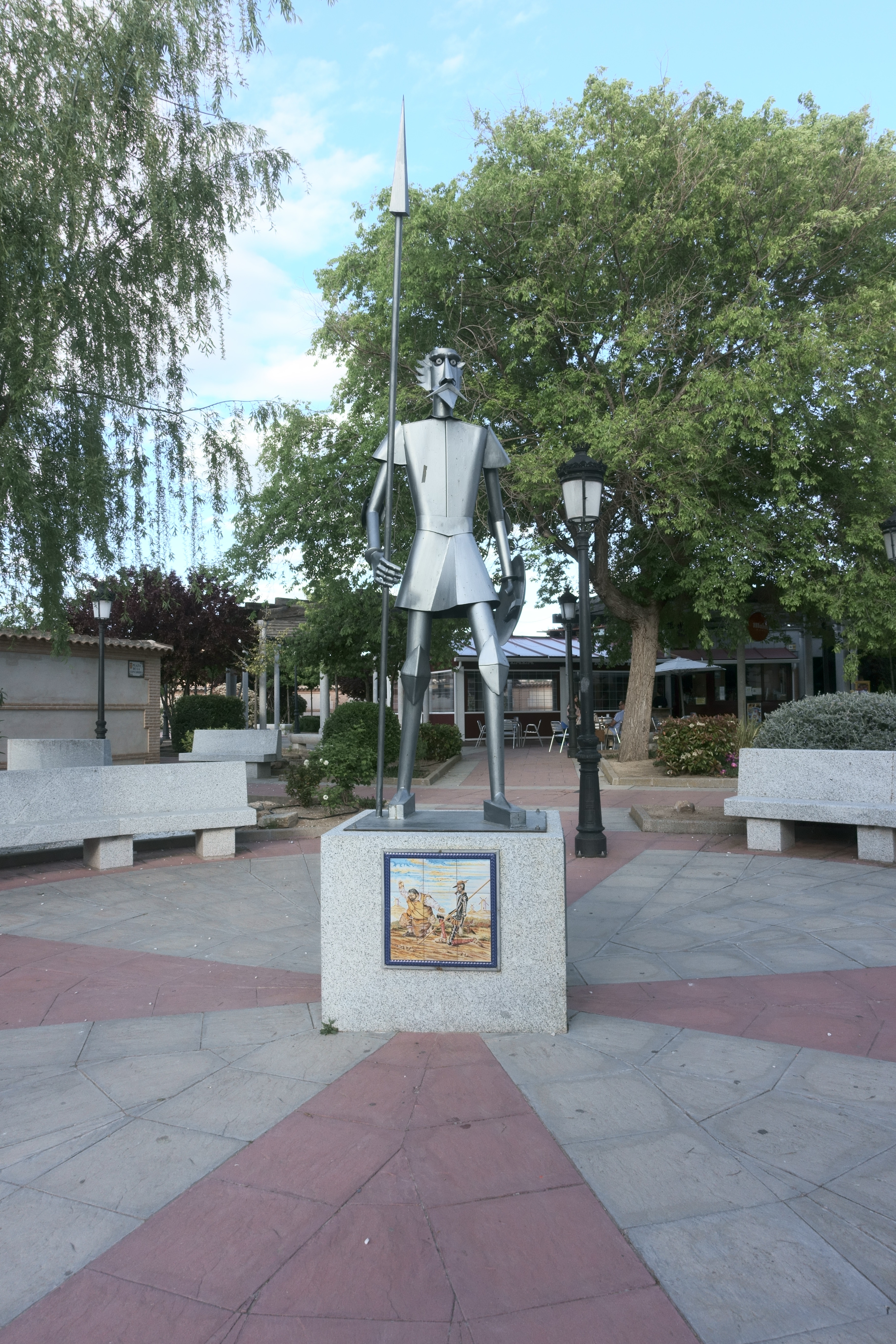 Monumento al Quijote en Cobisa (Toledo, España).